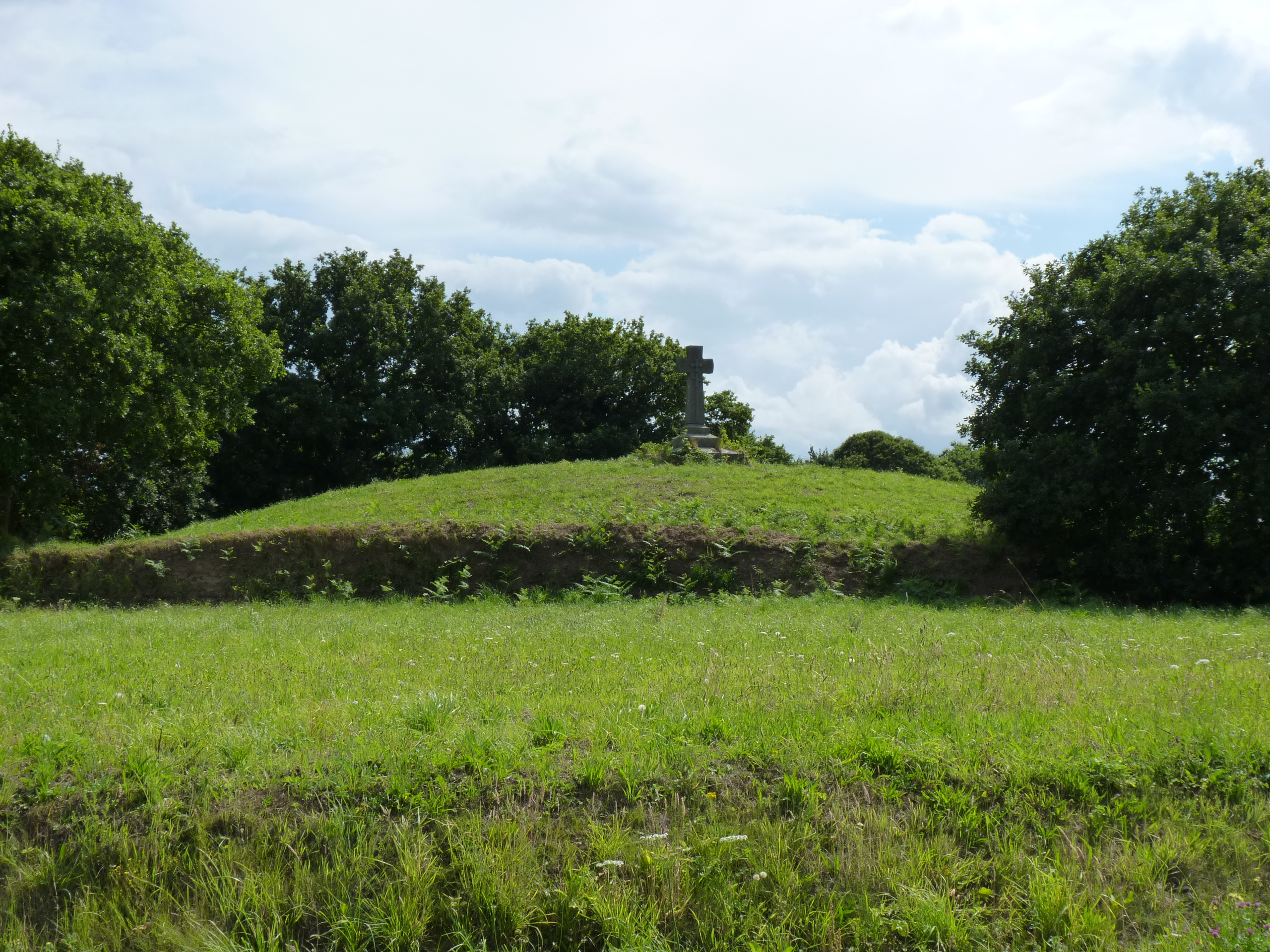 Il s'agit en fait d'un tumulus (christianisé) cachant un dolmen (non accessible).